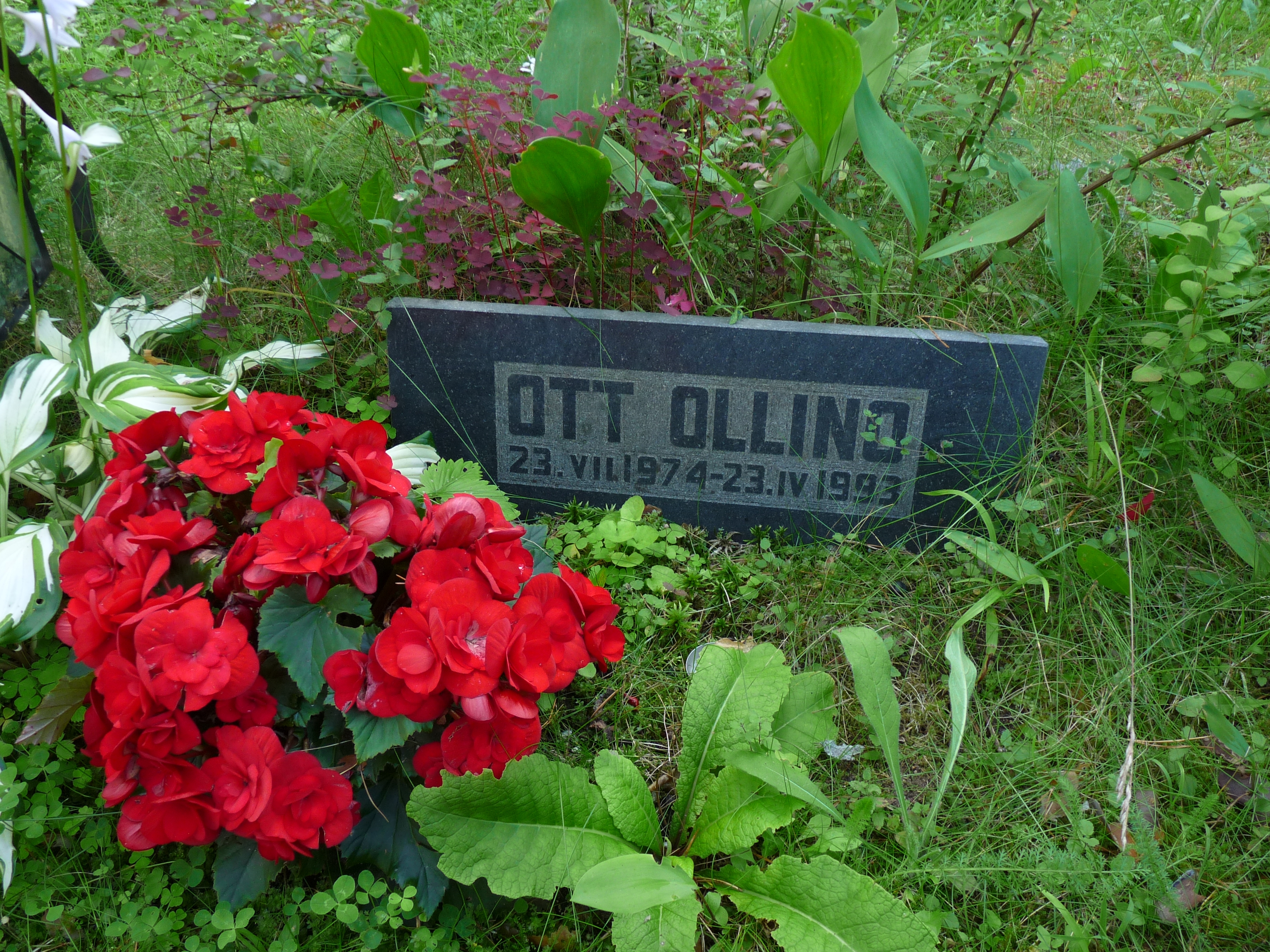 Ott Ollino ehk Jim Ollinovski kalm Elva kalmistul